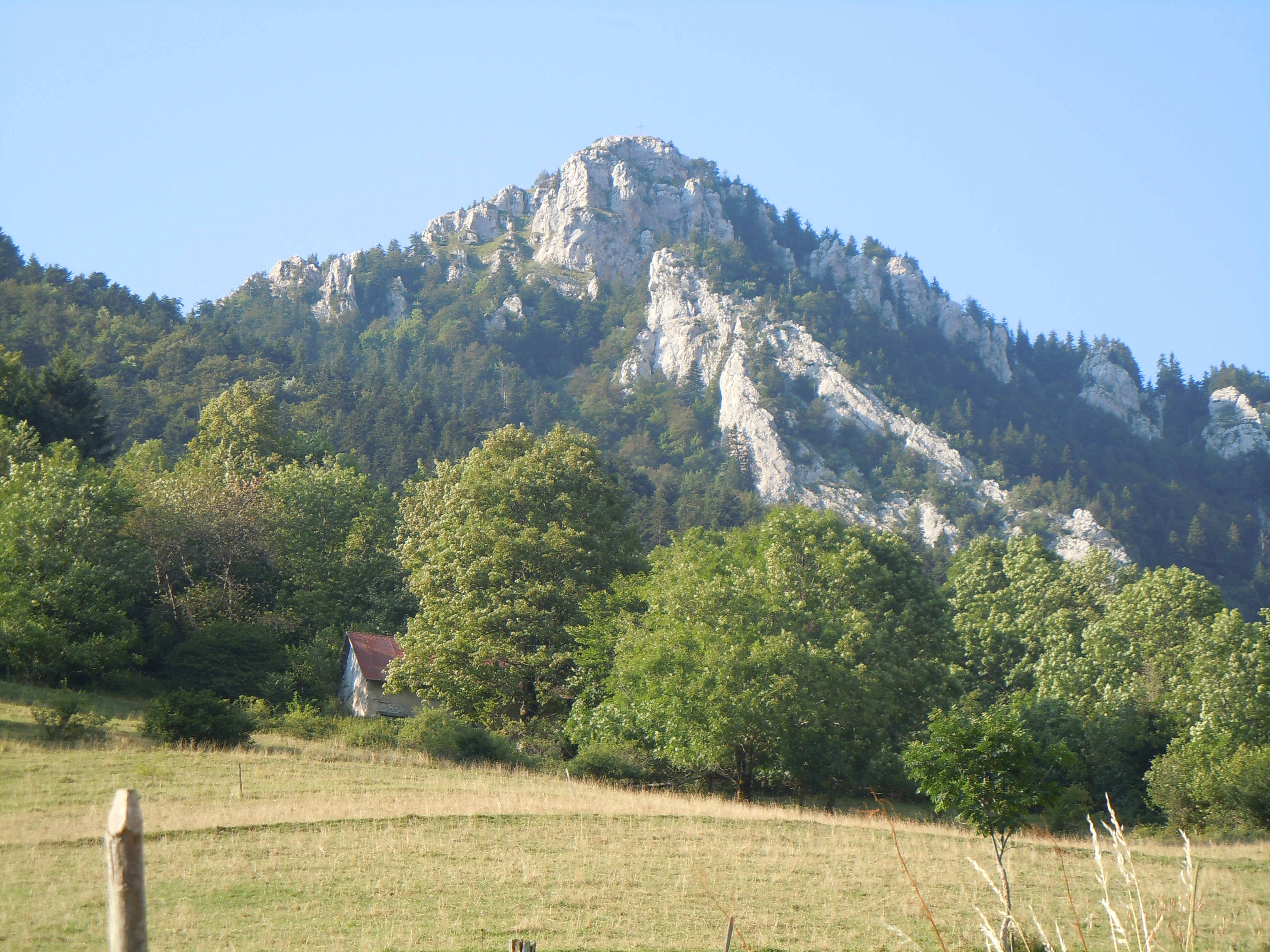 La Cochette depuis les Cruz à Corbel (Savoie)